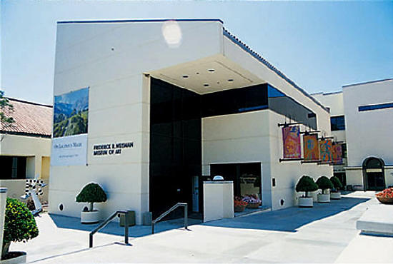 Pepperdine